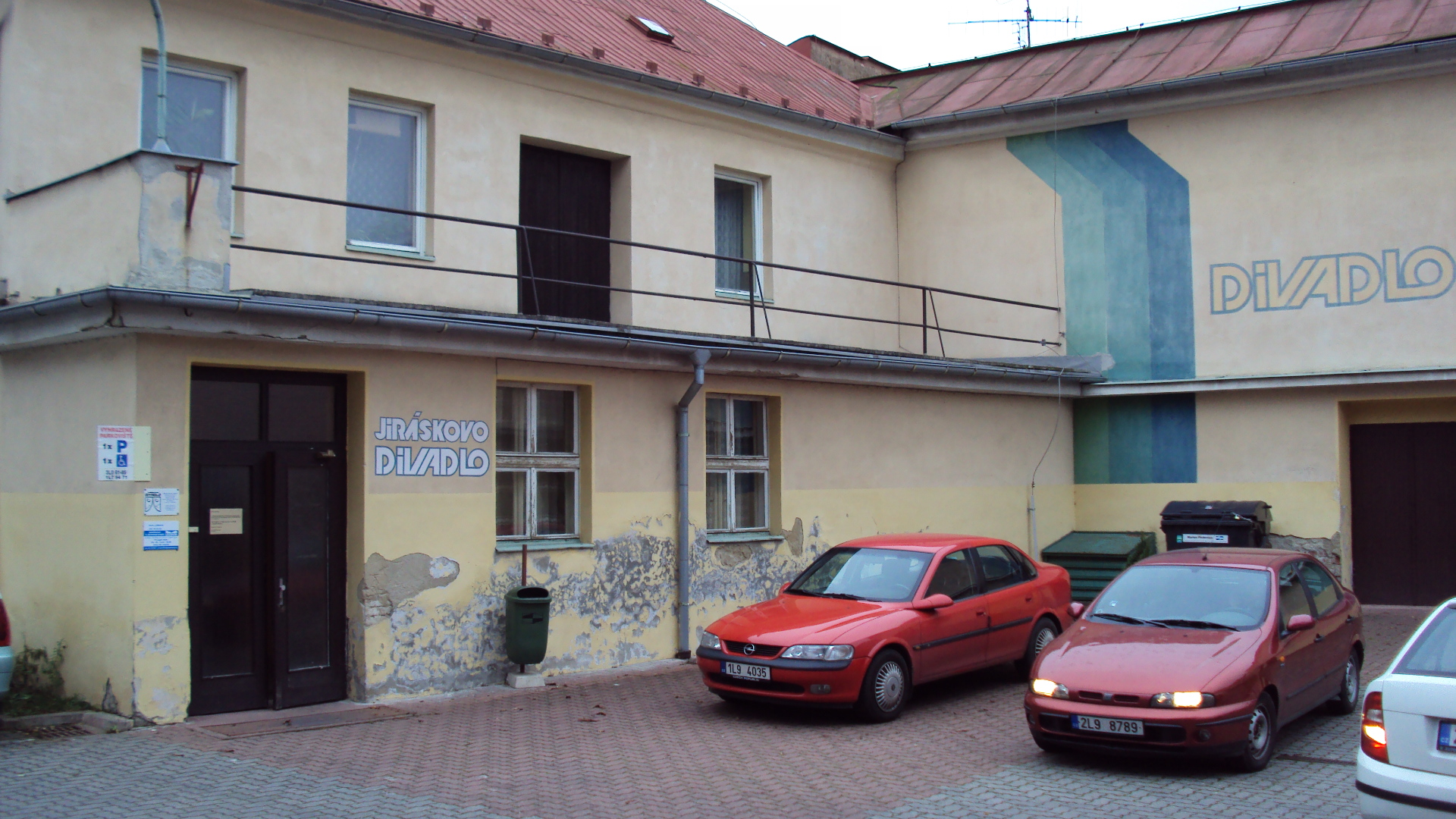 Jiráskovo městské divadlo v České Lípě z vnějšku, vchod